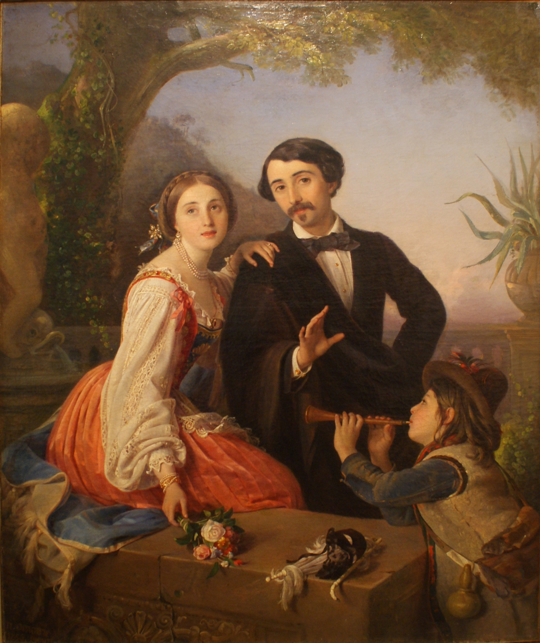 Партрэт А. І. Лорыс-Мелікава (Арцемія) з жонкай і італьянскім хлопчыкам